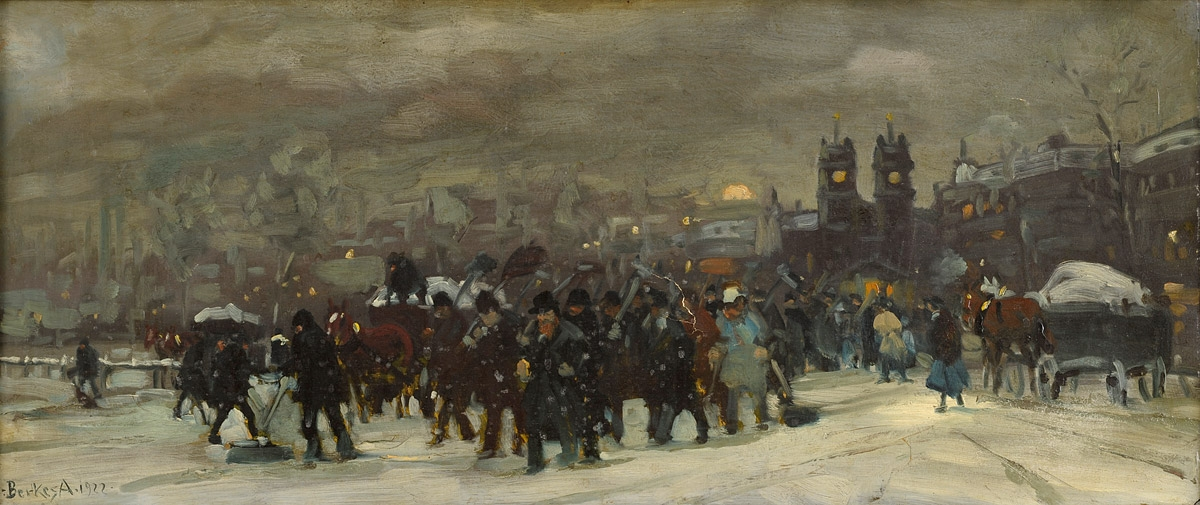 Wintertag (laut Auktionshaus "in Paris"). Signiert. Datiert 1922. Öl/Lwd., 36 x 82 cm